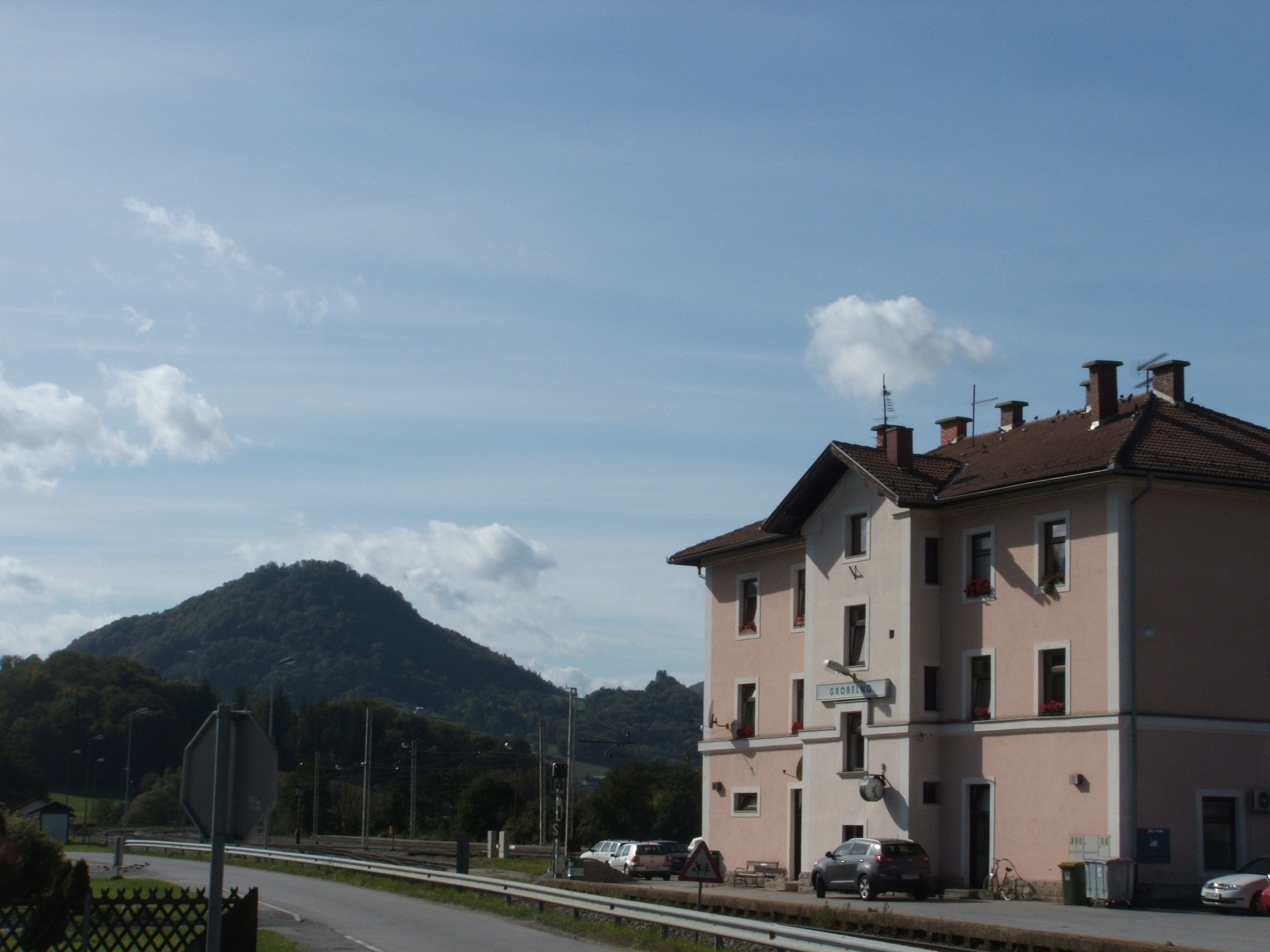 Grobelno